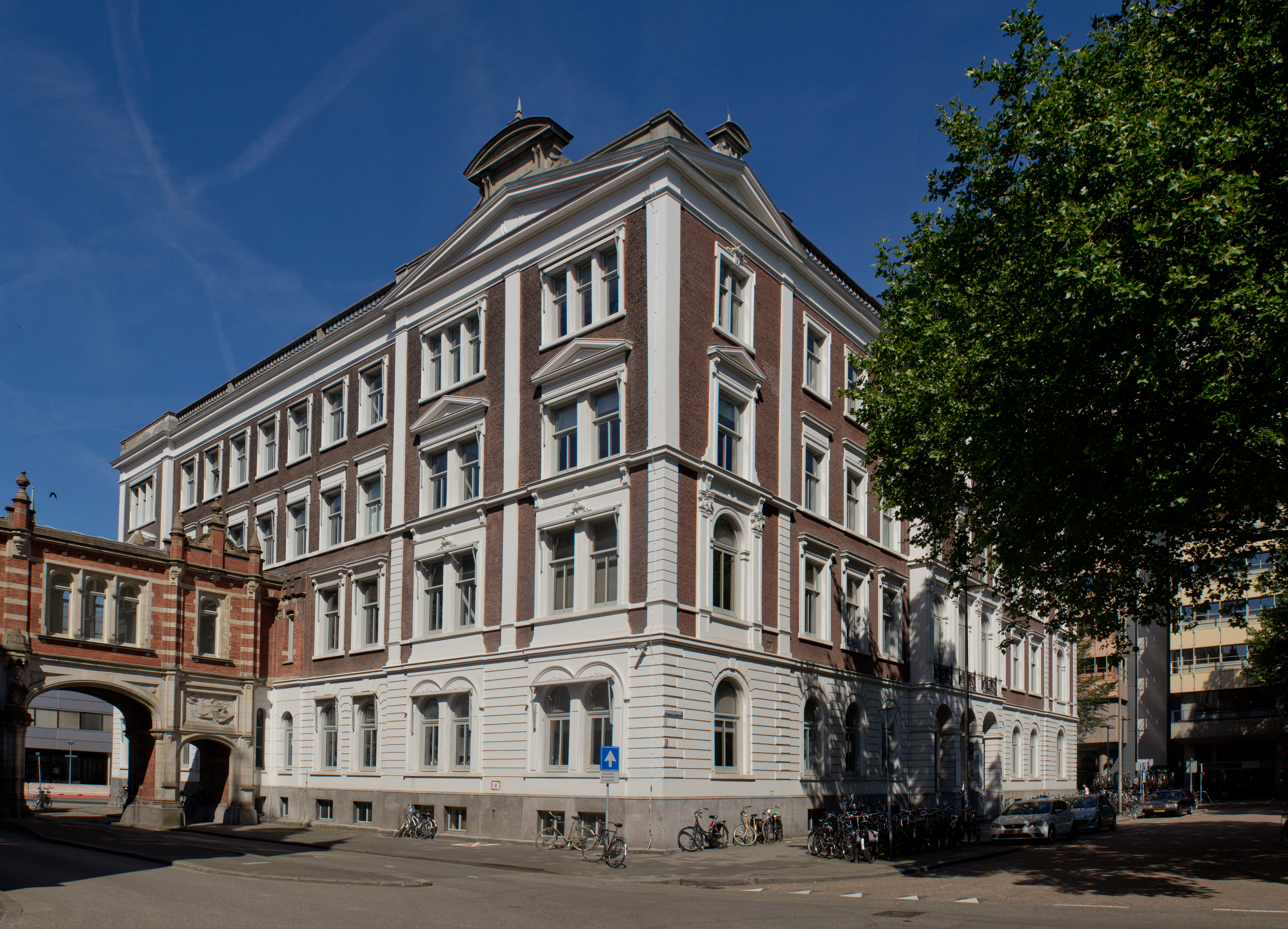 Hoofdgebouw I te Utrecht. Voormalig hoofdkwartier van de NS.